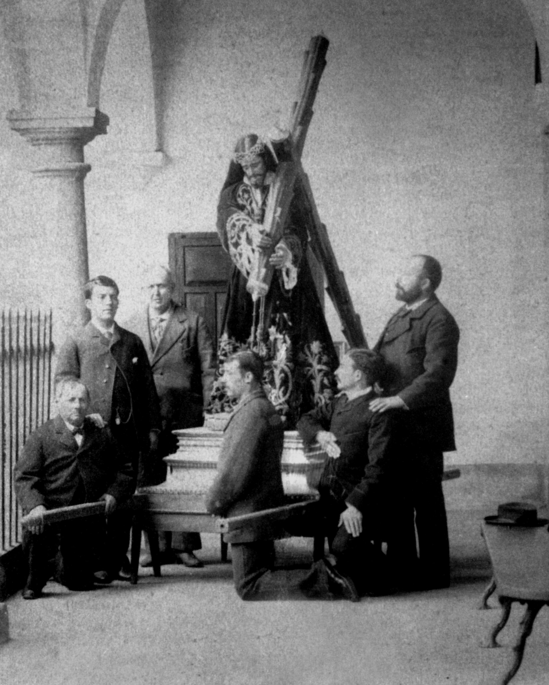 Junta de Gobierno de la cofradía del Nazareno de Linares, en oración antes de salir en procesión. 1880. Archivo de la cofradía.